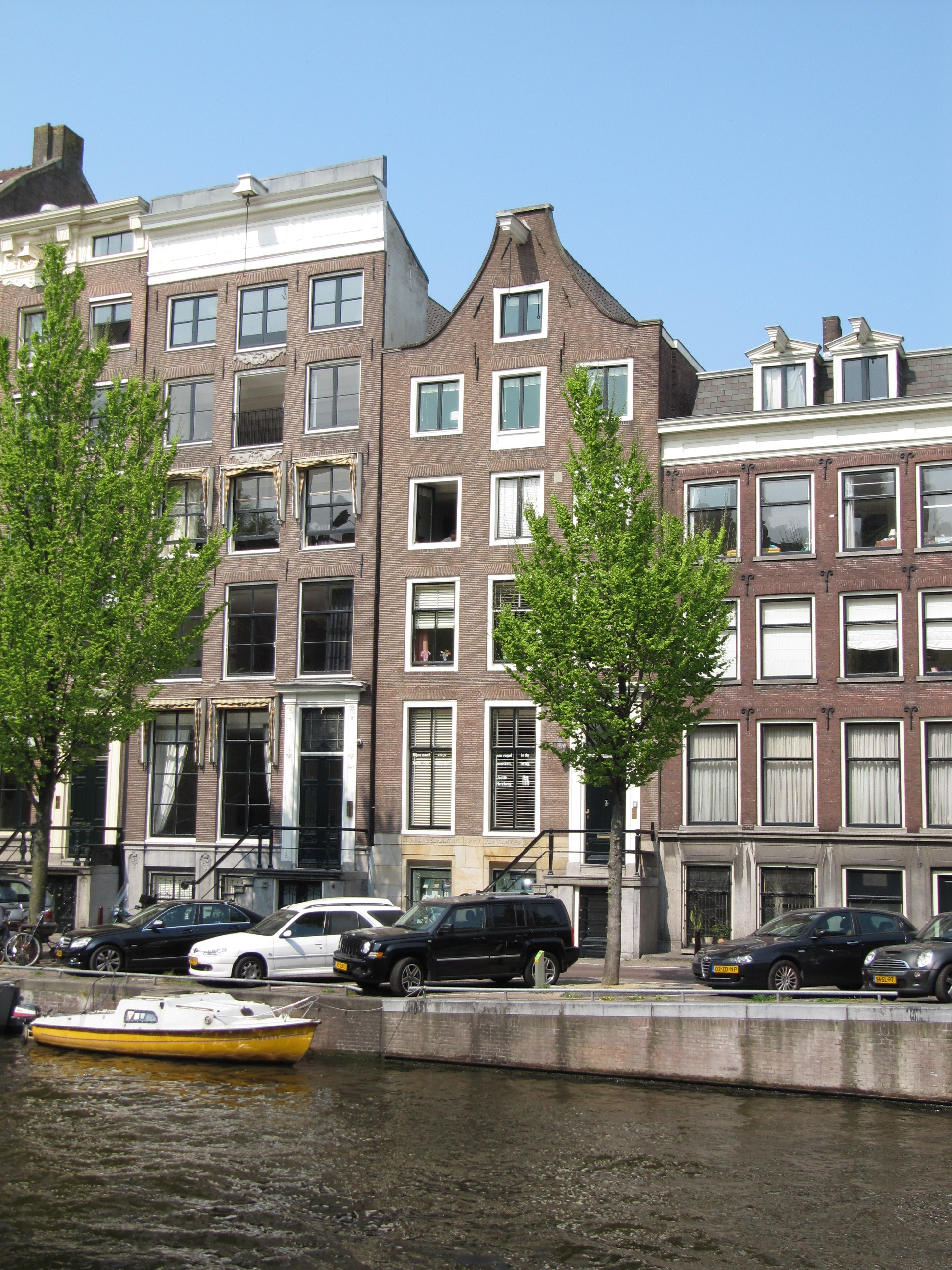 RM1675 Amsterdam - Herengracht 555.jpg